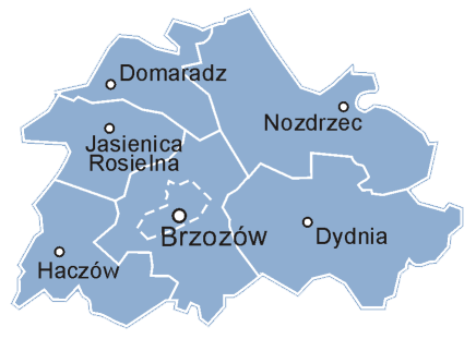 Schematyczna mapa powiatu brzozowskiego